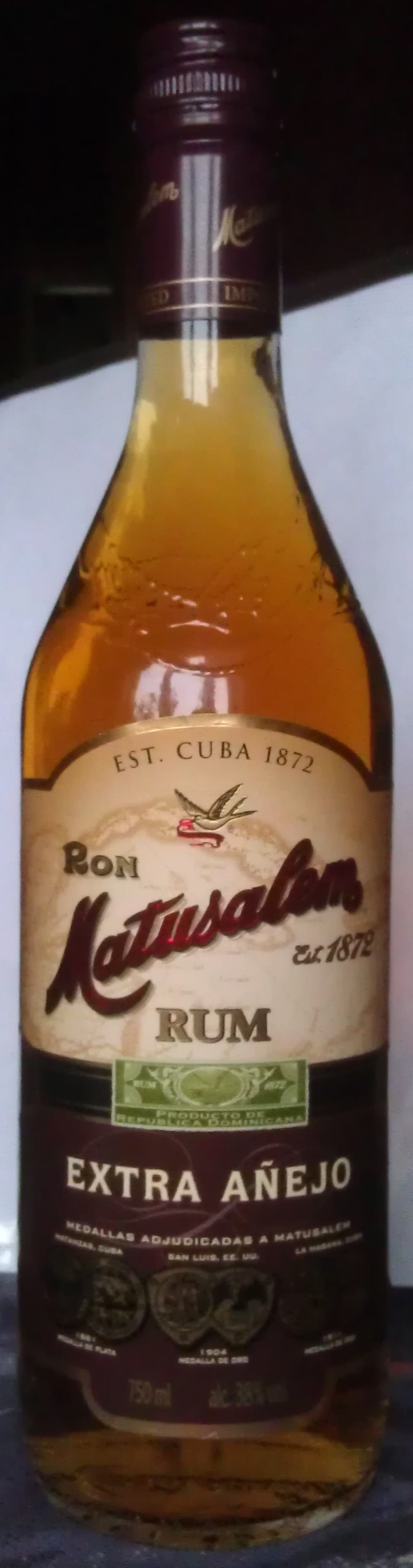 Фотография бутылки рома Matusalem, сделанная мною сразу после покупки в сетевом магазине.